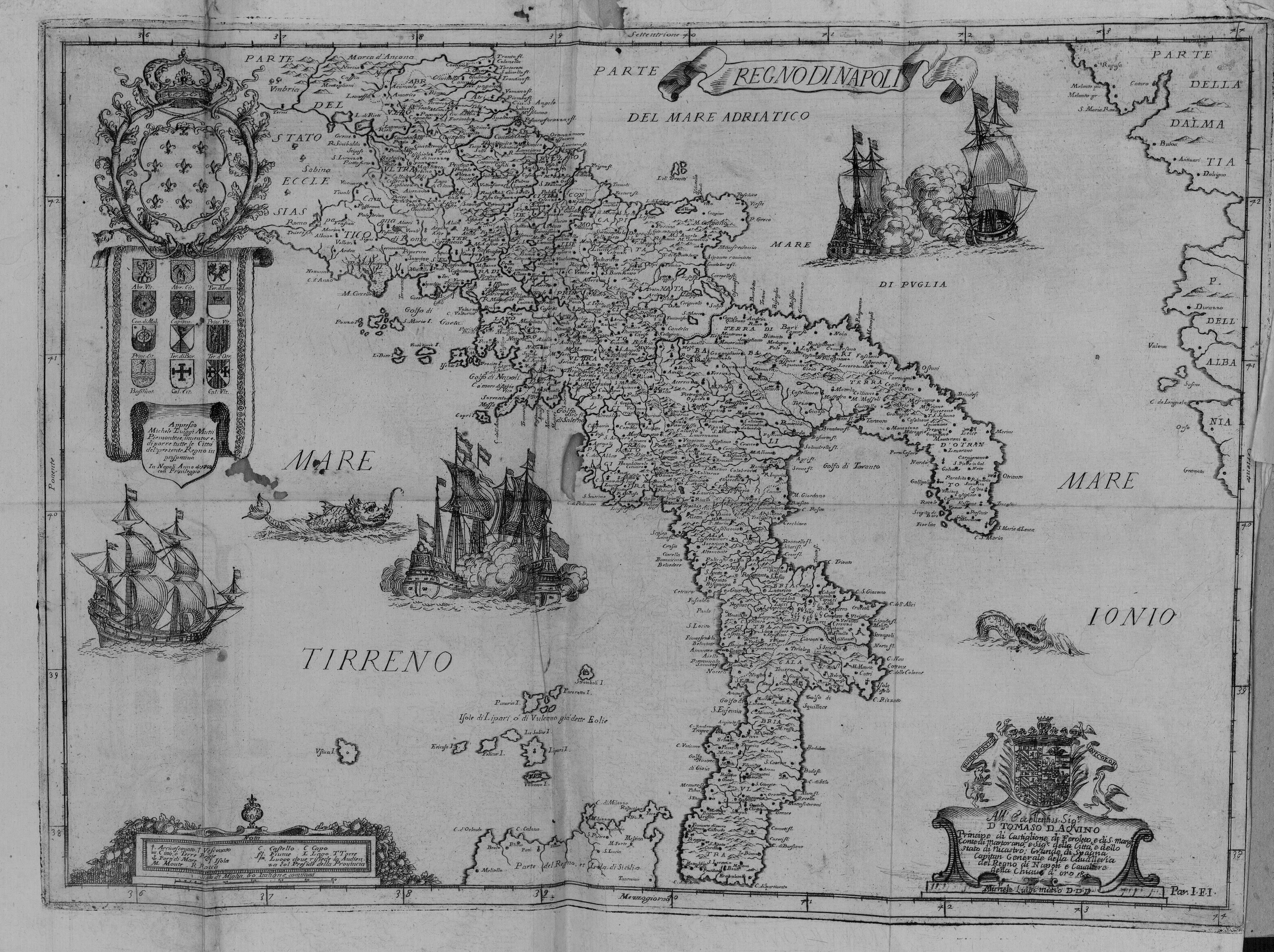 Autor: Pacichelli, Giovanni Battista, 1641-1702 Descripción bibliográfica: Il regno di Napoli in prospettiva : diviso in dodeci provincie, in cui si descrivono la sua Metropoli Fidelissima città di Napoli ... Opera postuma divisa in tre parti / dell'abatte Gio. Battista Pacichelli ; Parte prima [-terza] ... Del regno di Napoli in prospettiva / dell'abate Pacichelli. Parte prima. - In Napoli : nella Stamperia di Michele Luigi Mutio, 1703. - v. : principalmente il.; 4º . - Inic. adorn. y frisos dec. - Grab. calc. y h. pleg. grab. calc. de mapas de Cassianus de Silva. Ilustrador: Cassiano De Silva, Francesco, il. Impresor: Muzio, Michele Luigi, imp. Lugar de impresión: Italia. Nápoles -Localización: Vea la ilustración en su contexto